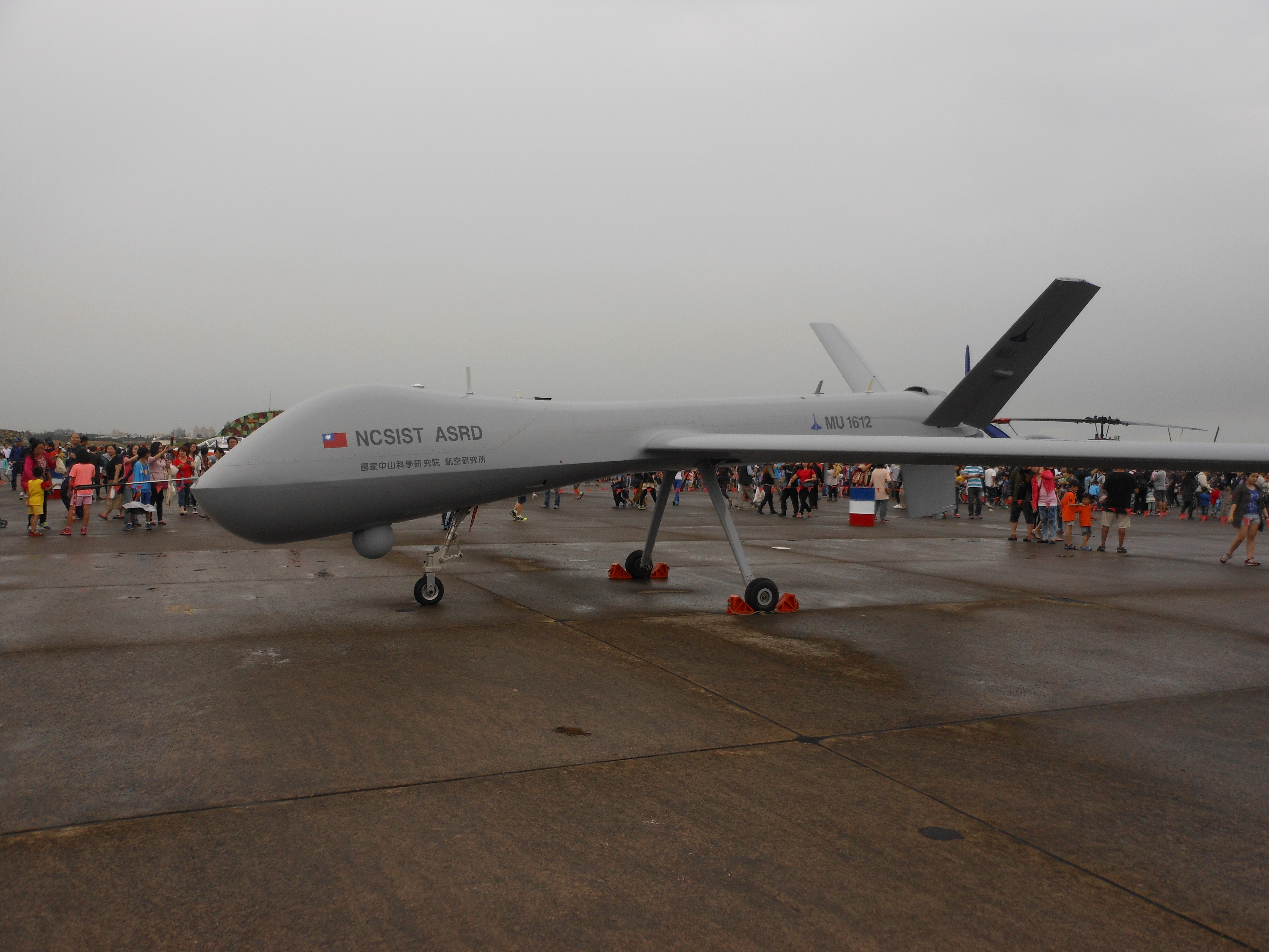 空軍新竹基地營區開放活動，中科院大型無人機機首左前方。